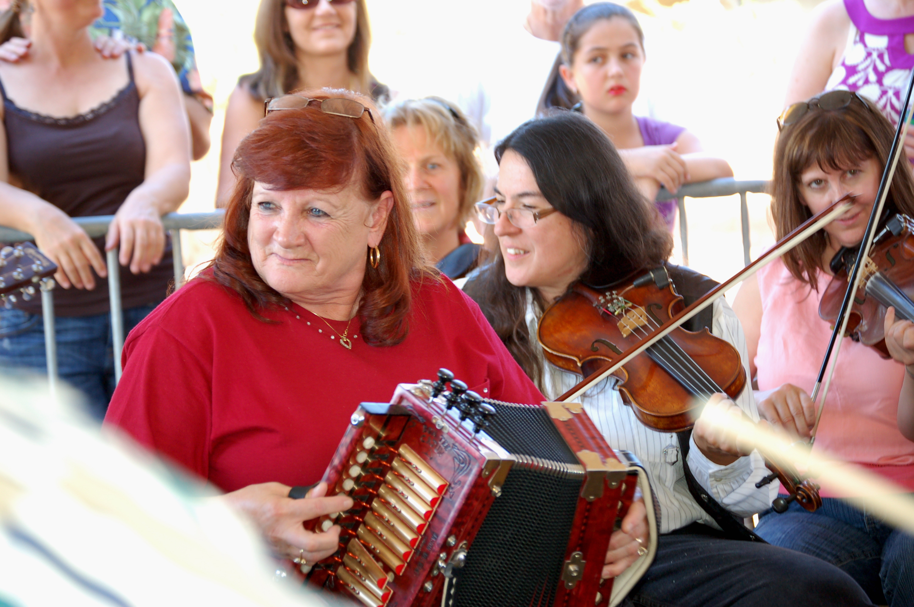 Festivals Acadiens et Créoles 2010, Lafayette, Louisiana. Cajun music jam.